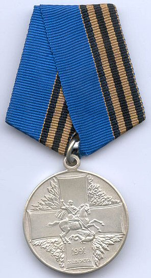 Медаль Защитнику свободной России